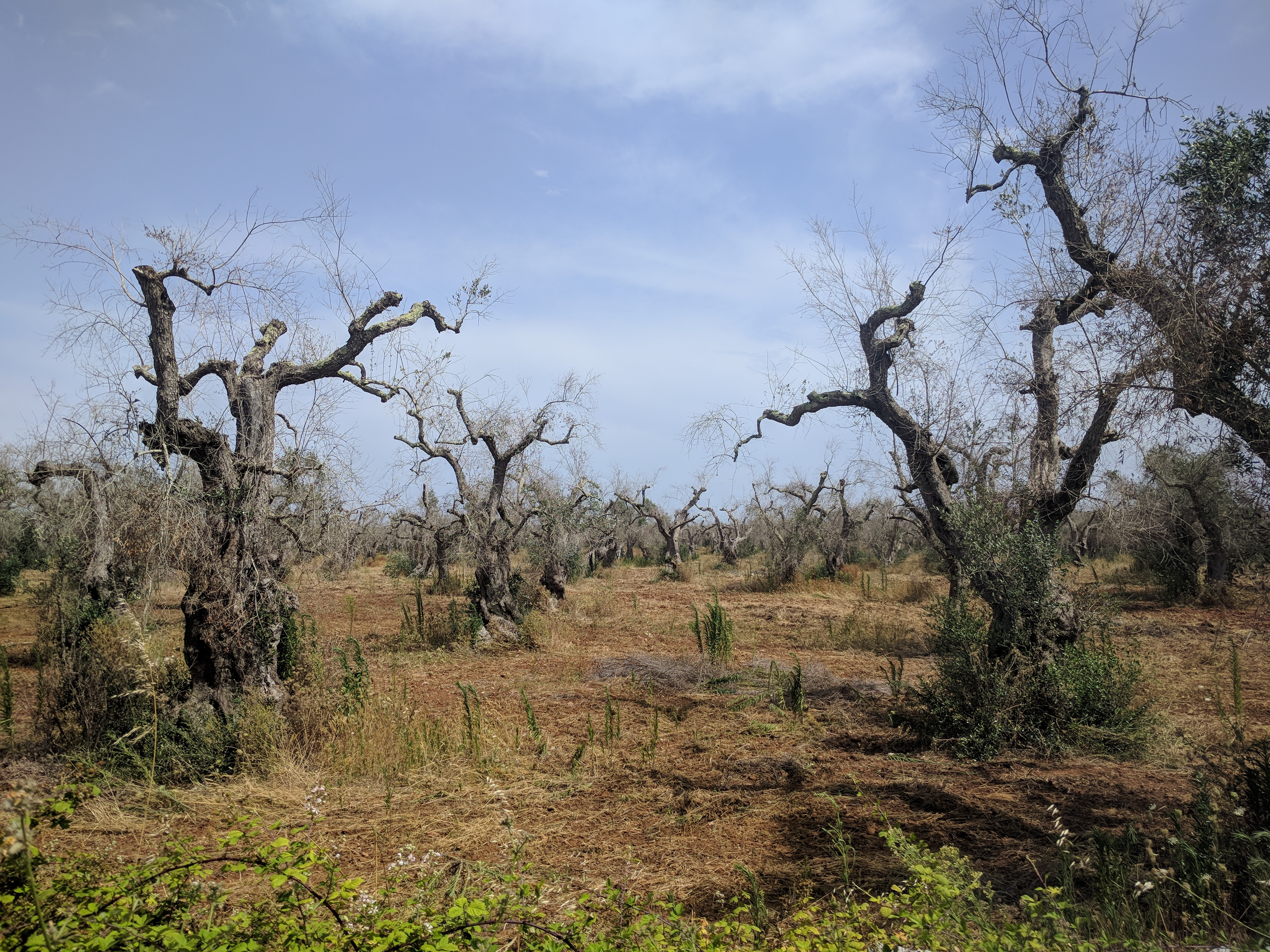 Ein von Xylella fastidiosa befallener Olivenhain in Surano (LE) in Apulien, Italien. Befallene Bäume verlieren ihre Blätter und sterben letztlich ab. Viele Besitzer versuchen, durch das Absägen der Äste die Ausbreitung des Bakteriums einzudämmen.